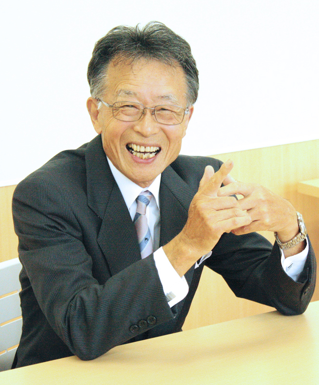 ルネサンス高校豊田校校長。2015年撮影。仮説実験授業研究会の事務局長を長く務めた。